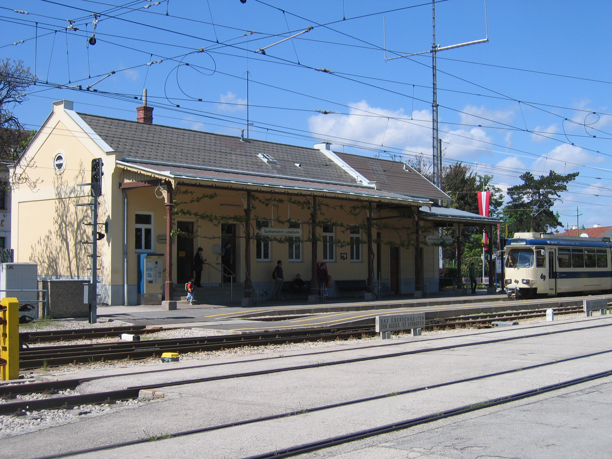 Wiener Lokalbahn, station "Guntramsdorf", Lower Austria